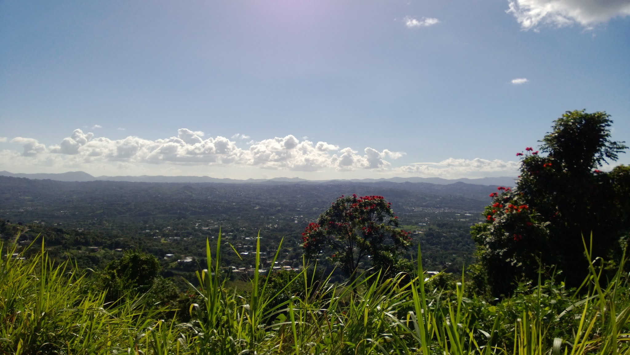 Collores, Las Piedras, Puerto Rico